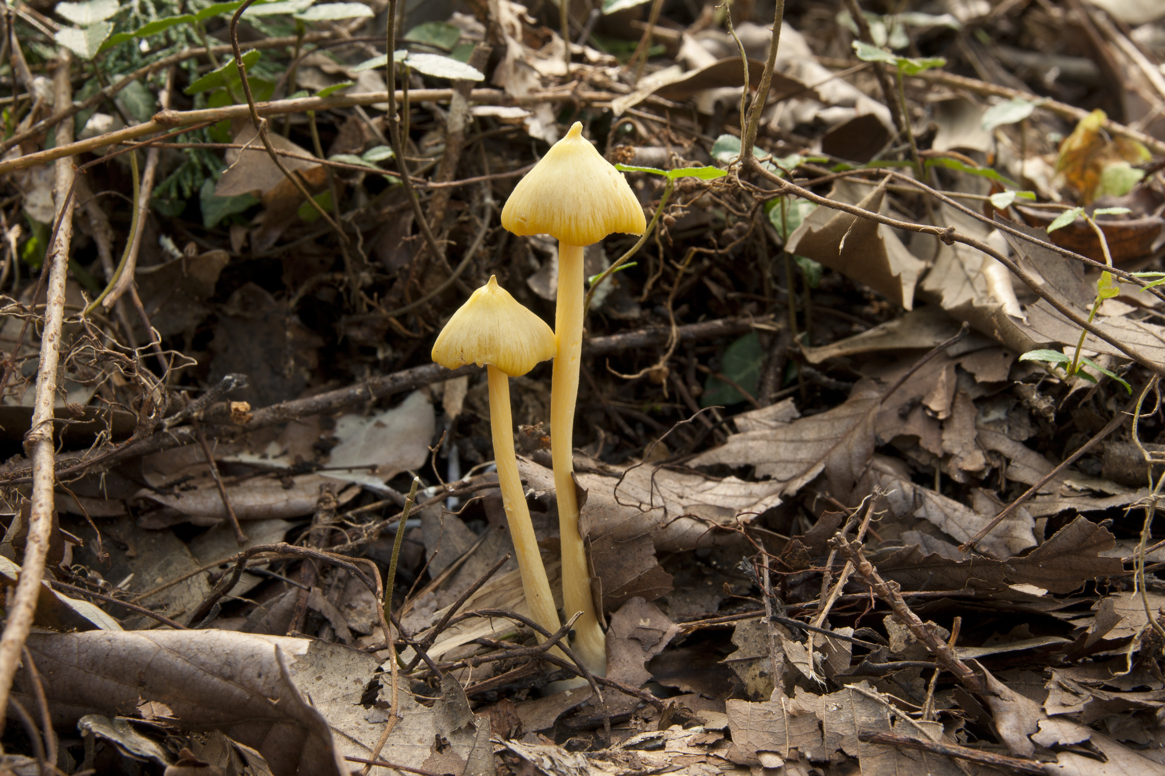 キイボカサタケ (学名:Entoloma murrayi)